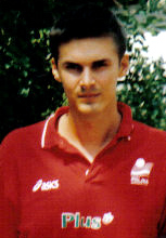 Michał Bąkiewicz